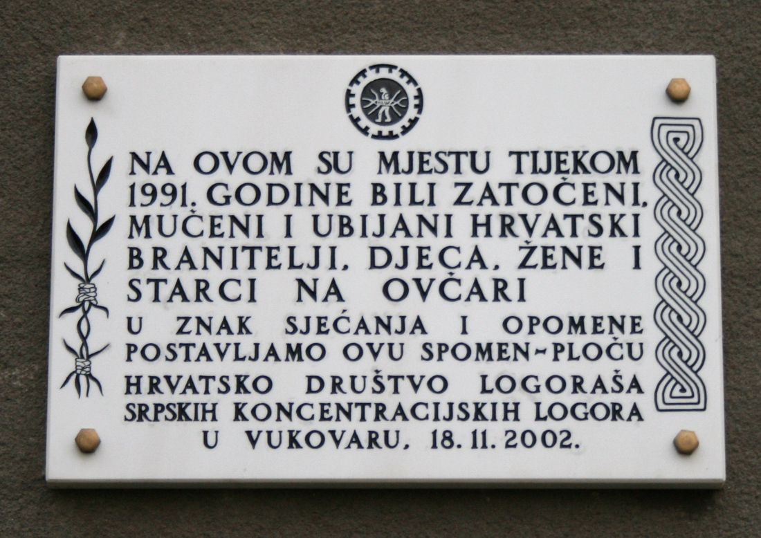 Ploča na Spomen domu Ovčara